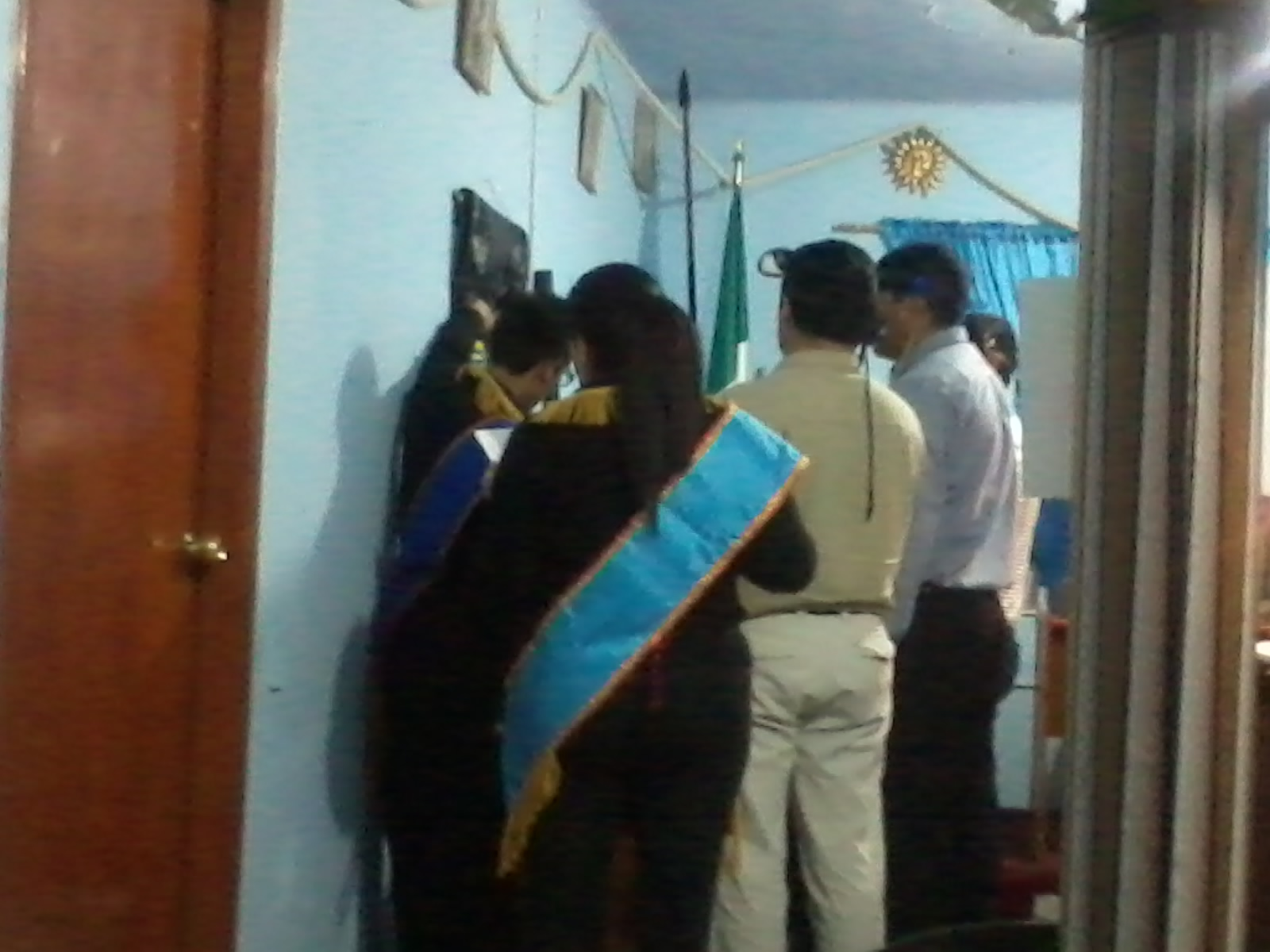 Ceremonia de aumento de salario (paso del grado de aprendiz al grado de compañero) en una logia del Rito Nacional Mexicano (masonería, México, D.F.)